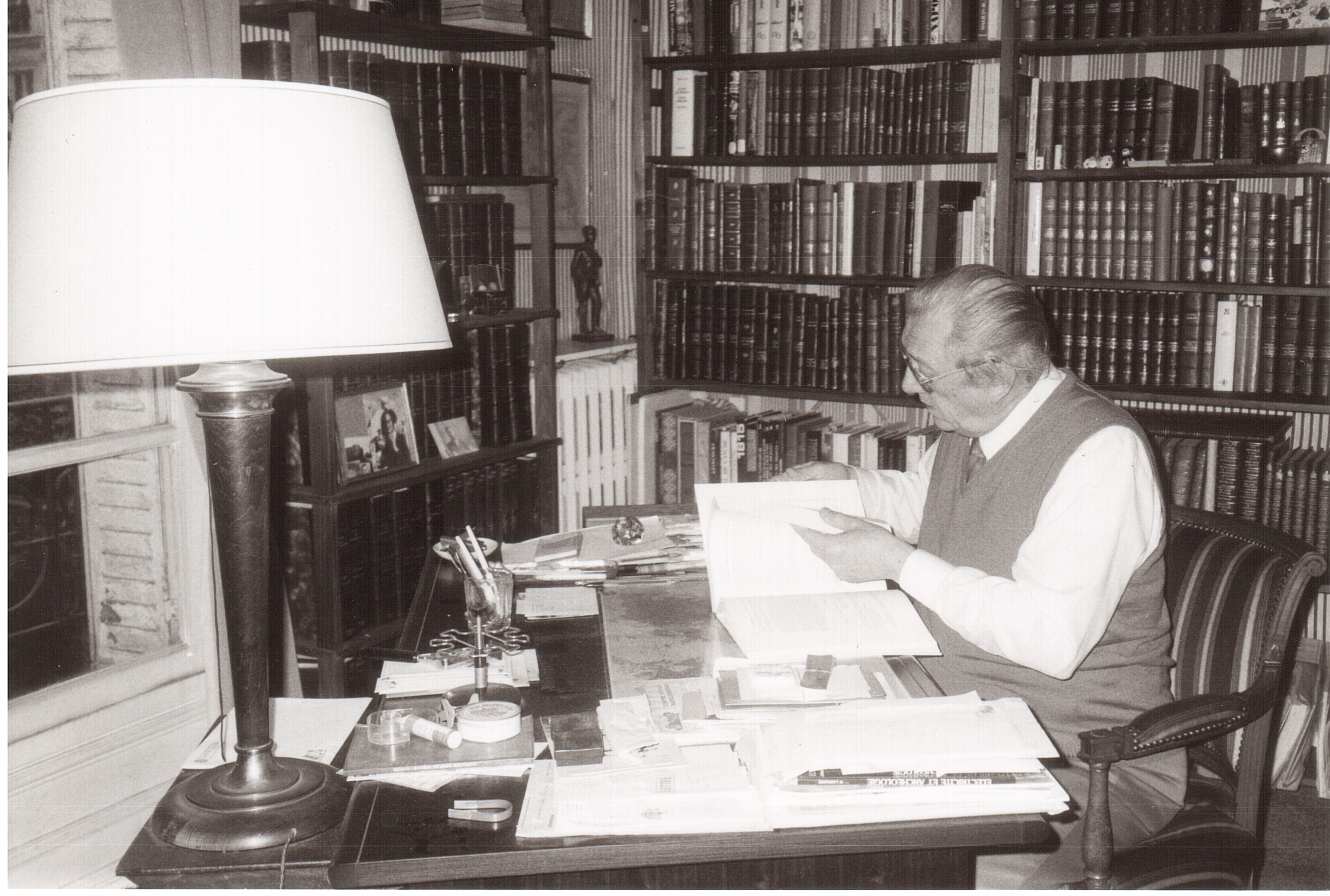 Le professeur Fernand Emile Beaucour à son bureau de travail, dans sa résidence du 12 rue Pasteur à Levallois-Perret (France), en 1989. Photos prise par son épouse, madame Camille Beaucour